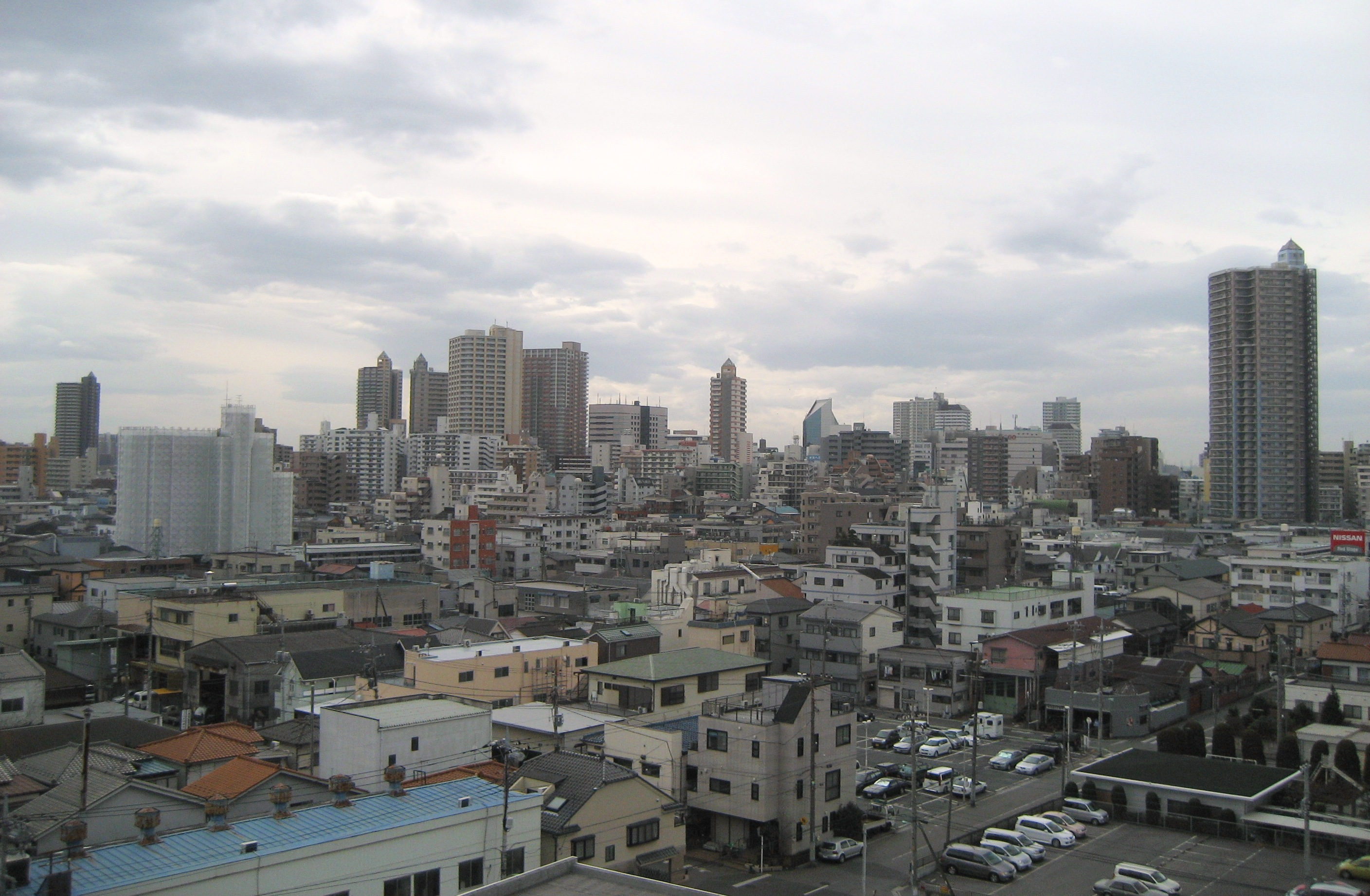 川口駅周辺高層建物